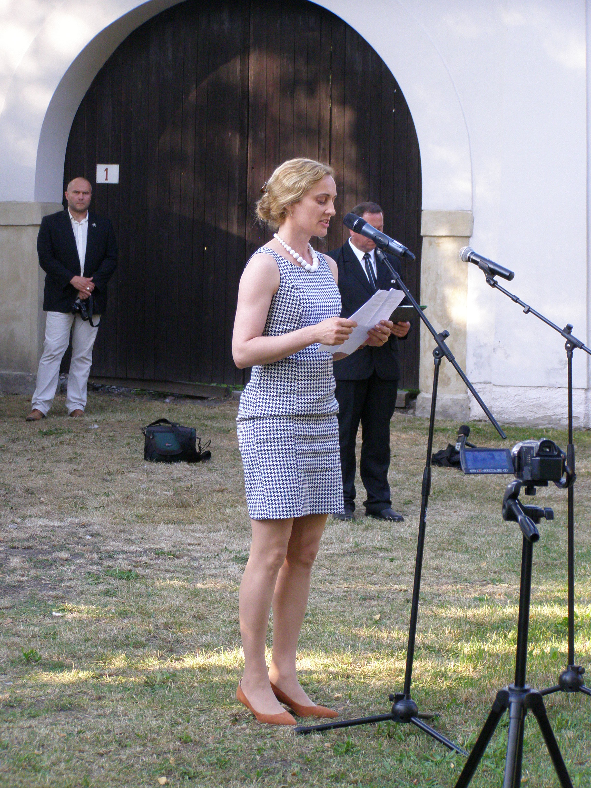 Sandra Mašínová (dcera Josefa Mašína mladšího) - politoložka žijící v Německu. V Lošanech 12. září 2016 před statkem rodiny Mašínů (v rámci oslav 120. výročí narození jejího dědečka Josefa Mašína staršího) přečetla dopis svého otce (Josfa Mašína mladšího), který byl věnovan této příležitosti.